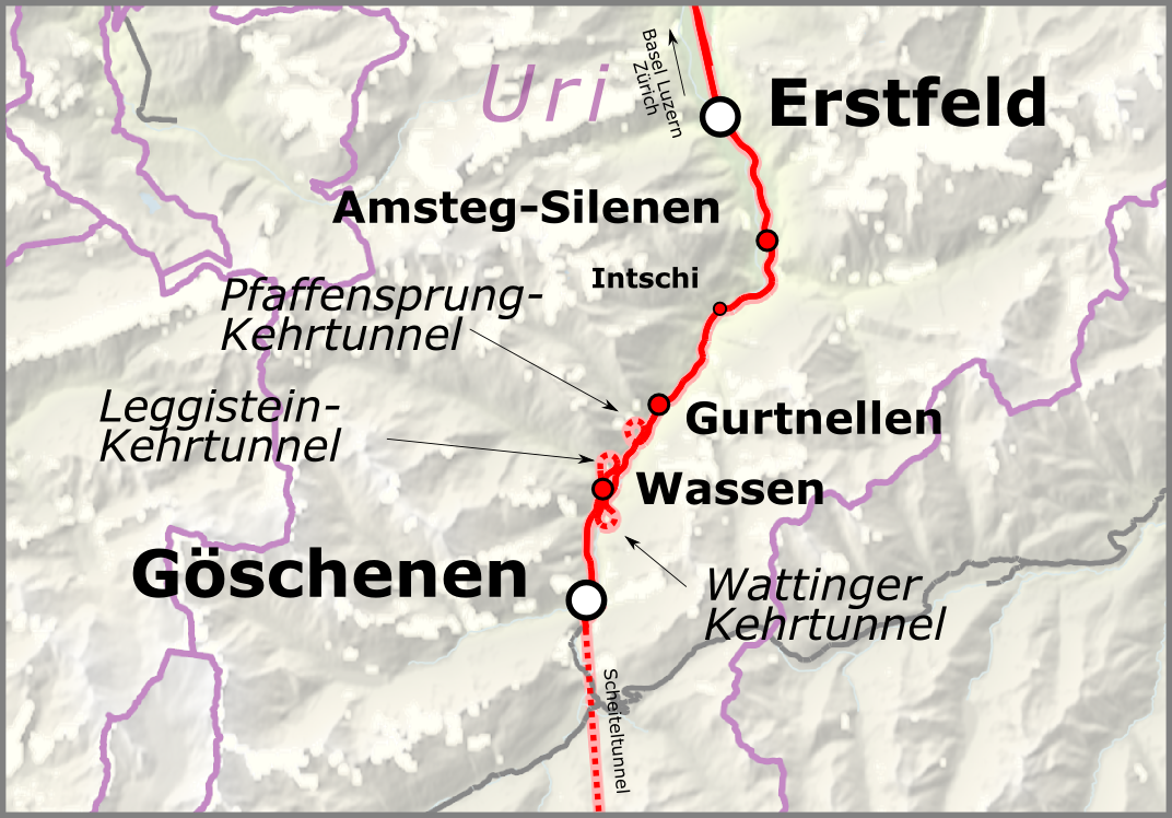 Karte der Nordrampe der Gotthardbahn in der Schweiz.